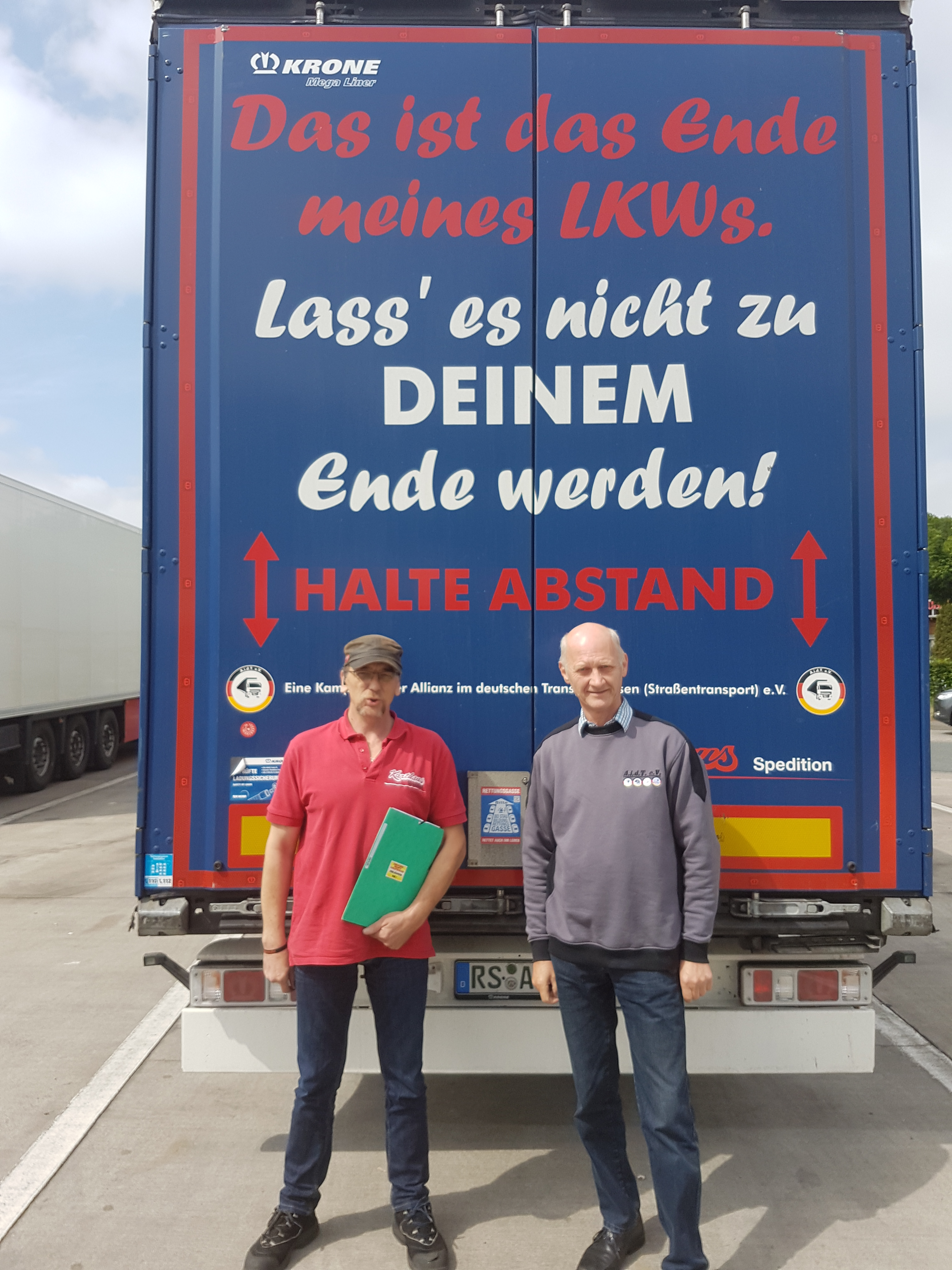 Udo Skoppeck A.i.d.T.e.V. (links) und Gregor Ter Heide (rechts)